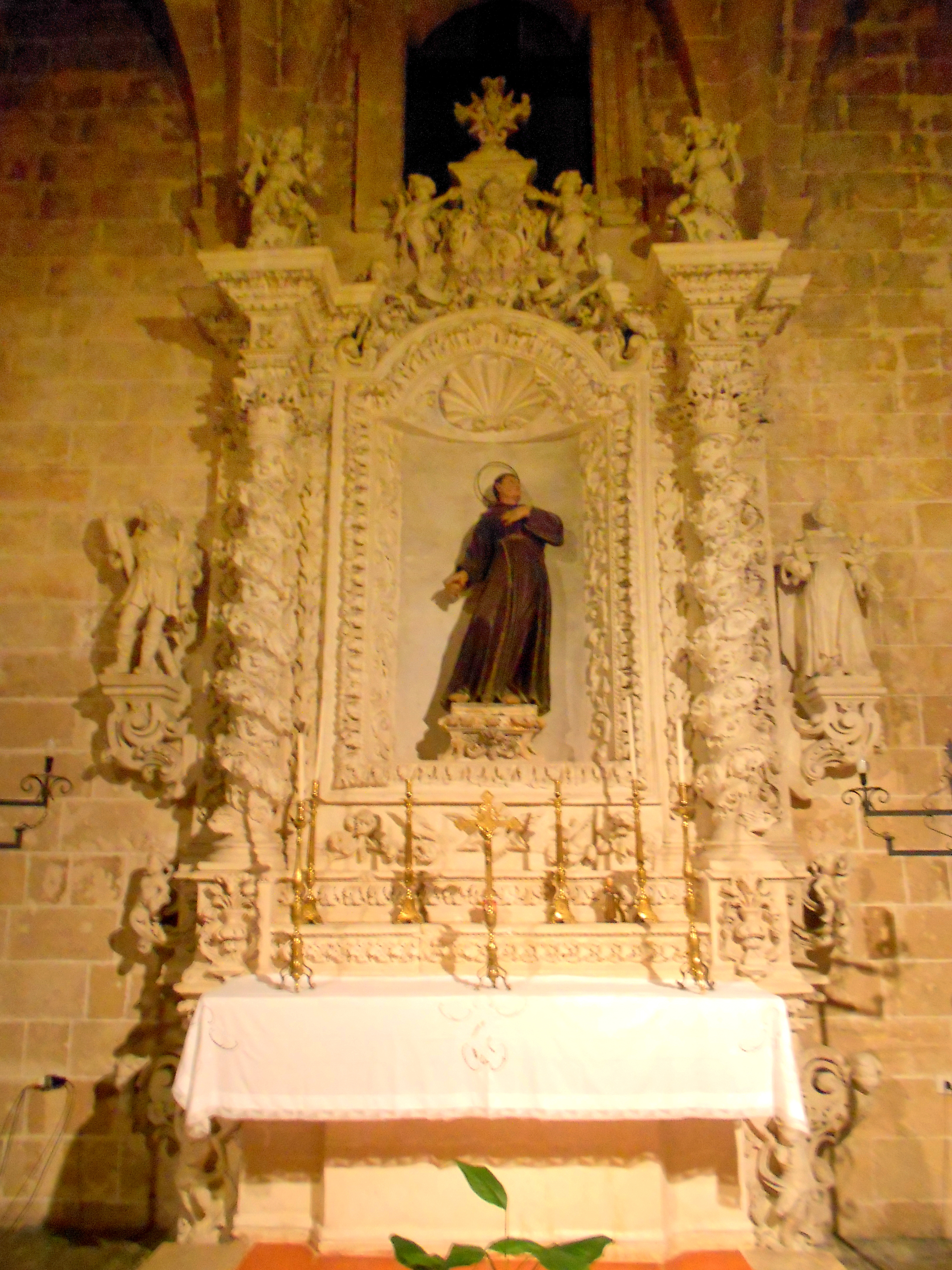 Altare di San Pasquale, convento S.M. delle Grazie di Maruggio